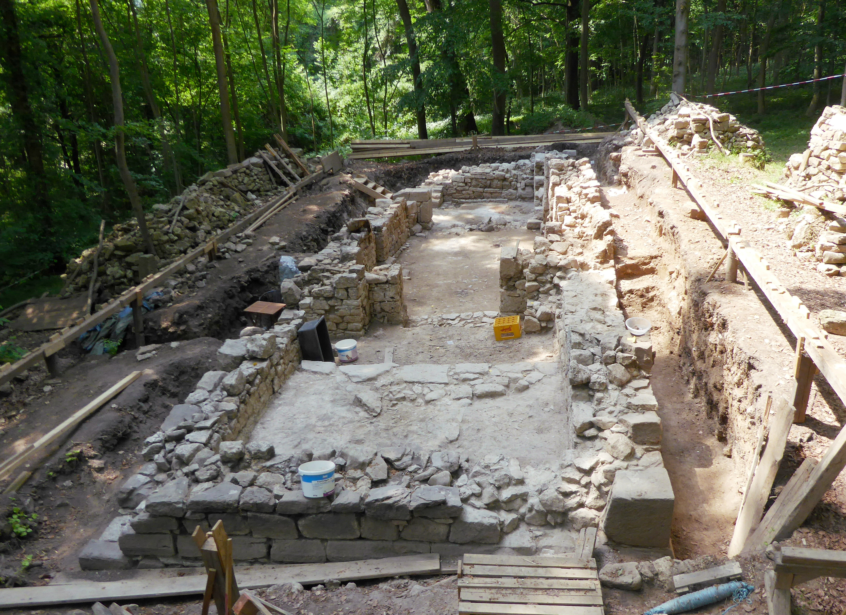 Archäologische Grabung an einer Kirchenruine nahe Asche, Stadt Hardegsen, Südniedersachsen. Blick von Osten über die ergrabenen Reste: Vorn der Chorraum der Kirche mit im Ostteil um eine Stufe erhöhtem Fußboden, dahinter die Chorschranke, das zweijochige Kirchenschiff und hinten die Mauerreste des Turms. Die Eingänge sind links (Südseite), im Chorraum die Priesterpforte, im Turmbereich die Laienpforte.